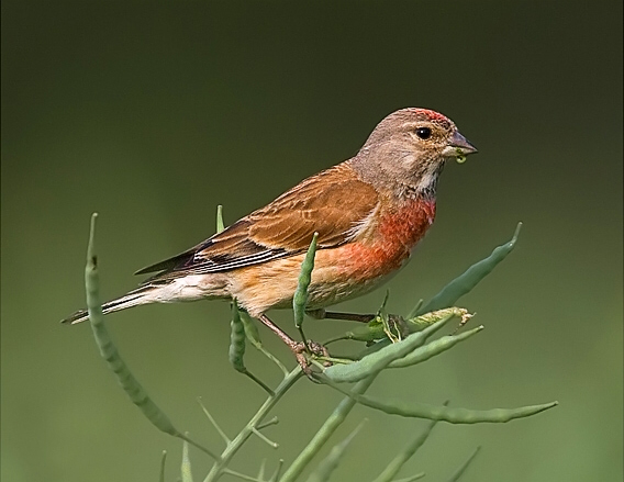 Carduelis cannabina, Olomouc, CZ